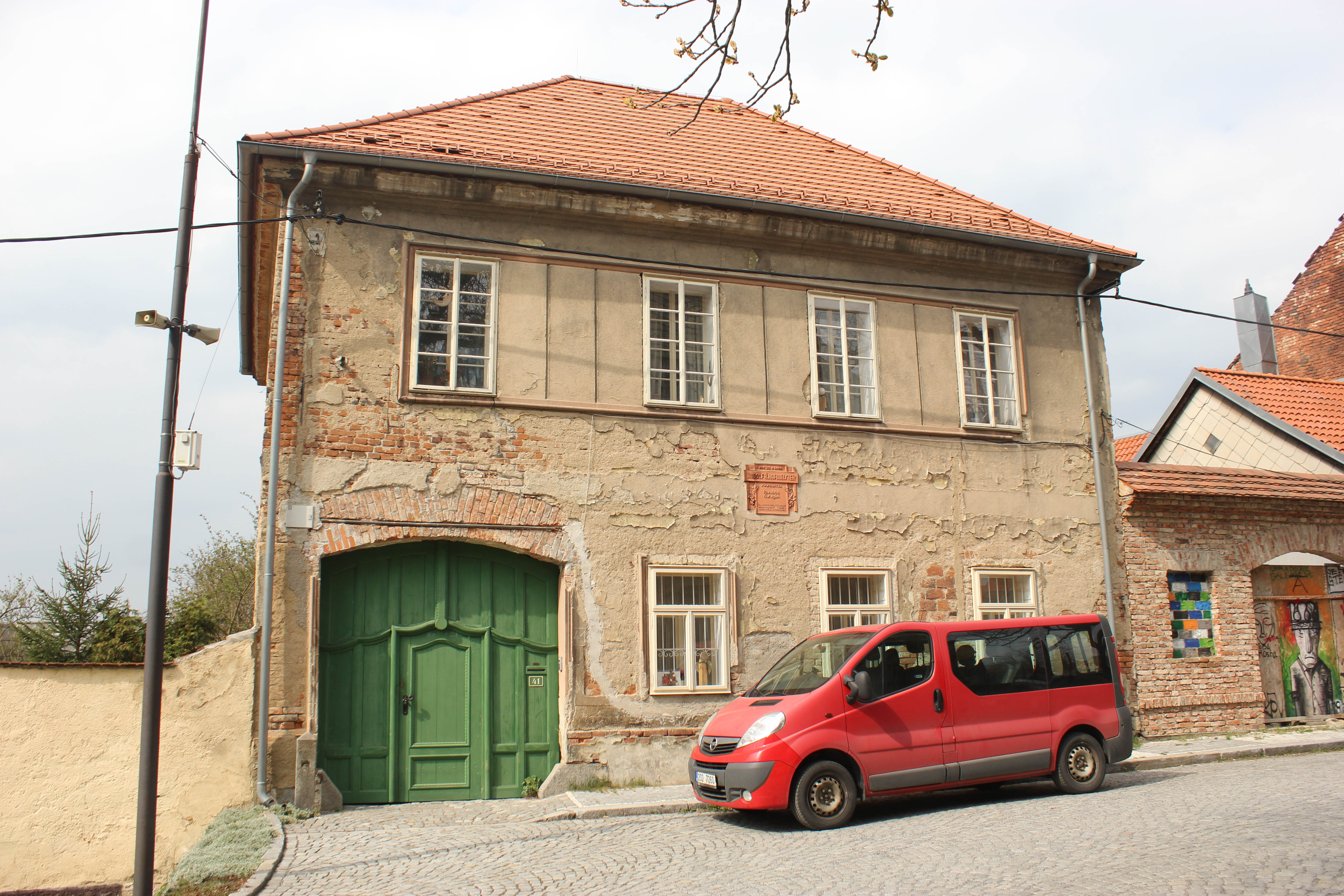 Dům R. R. Hofmeistra.